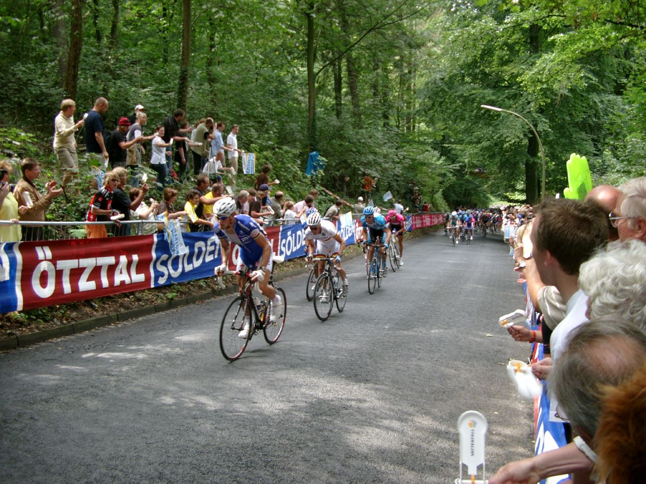 Vattenfall Cyclassics 2007. Fahrt auf den Waseberg in Hamburg-Blankenese.Cyclassics 2007